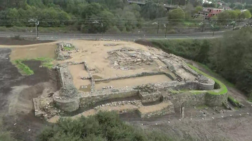 Vista aérea do castelo da Rocha Forte.